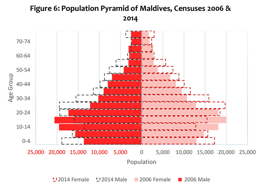 Половозрастная пирамида Мальдив, 2006-2014